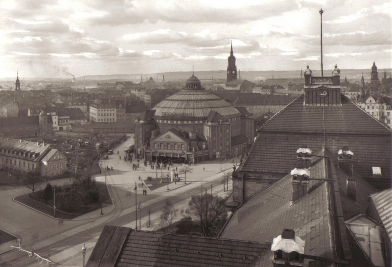 Ort: Dresden, Innere Neustadt, Carolaplatz. Der 1912 eröffnete Kuppelbau des Zirkus Sarrasani (Foto um 1914). Aufgenommen vom gemeinsamen Ministerialgebäude des damaligen Königlich-Sächsischen Ministeriums des Innern, der Justiz, des öffentlichen Unterrichts und Kultus. Heute: Sächsische Staatskanzlei.